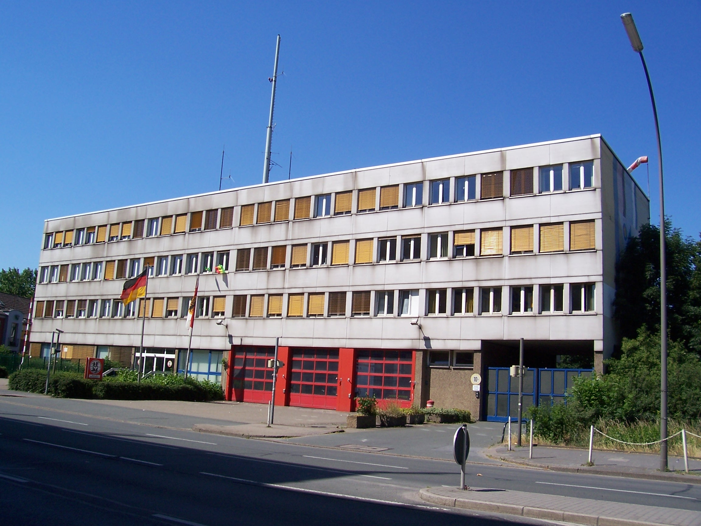 Alte Feuer- und Rettungswache 1 (abgerissen 2011), Old Fire station 1 in Dortmund (until 2011), Germany